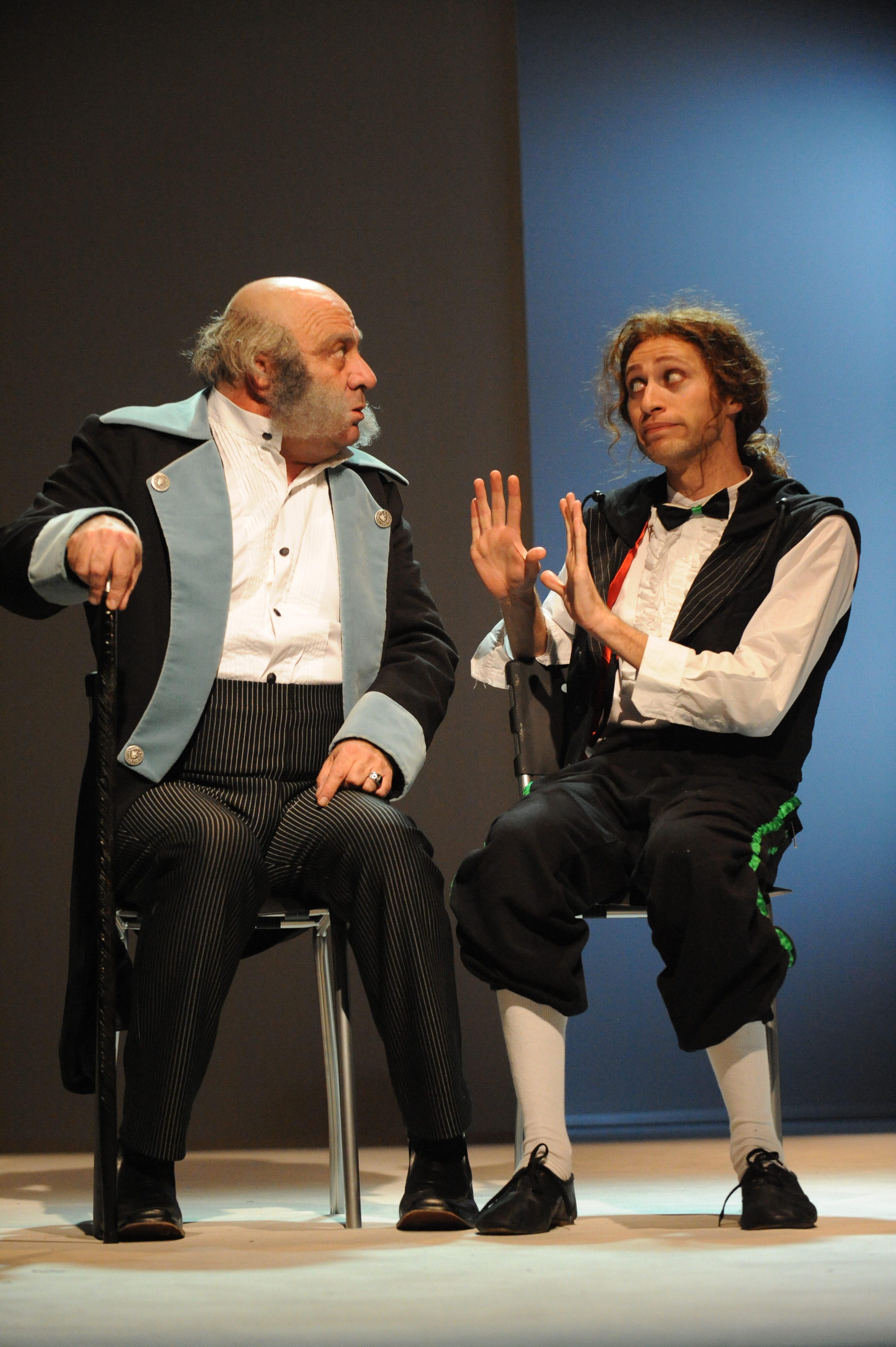 ויטלי פרידלנד ואריה צ'רנר, בהצגה "תעלולי סקפן", בבימויו של אודי בן-משה, תיאטרון החאן, 2010